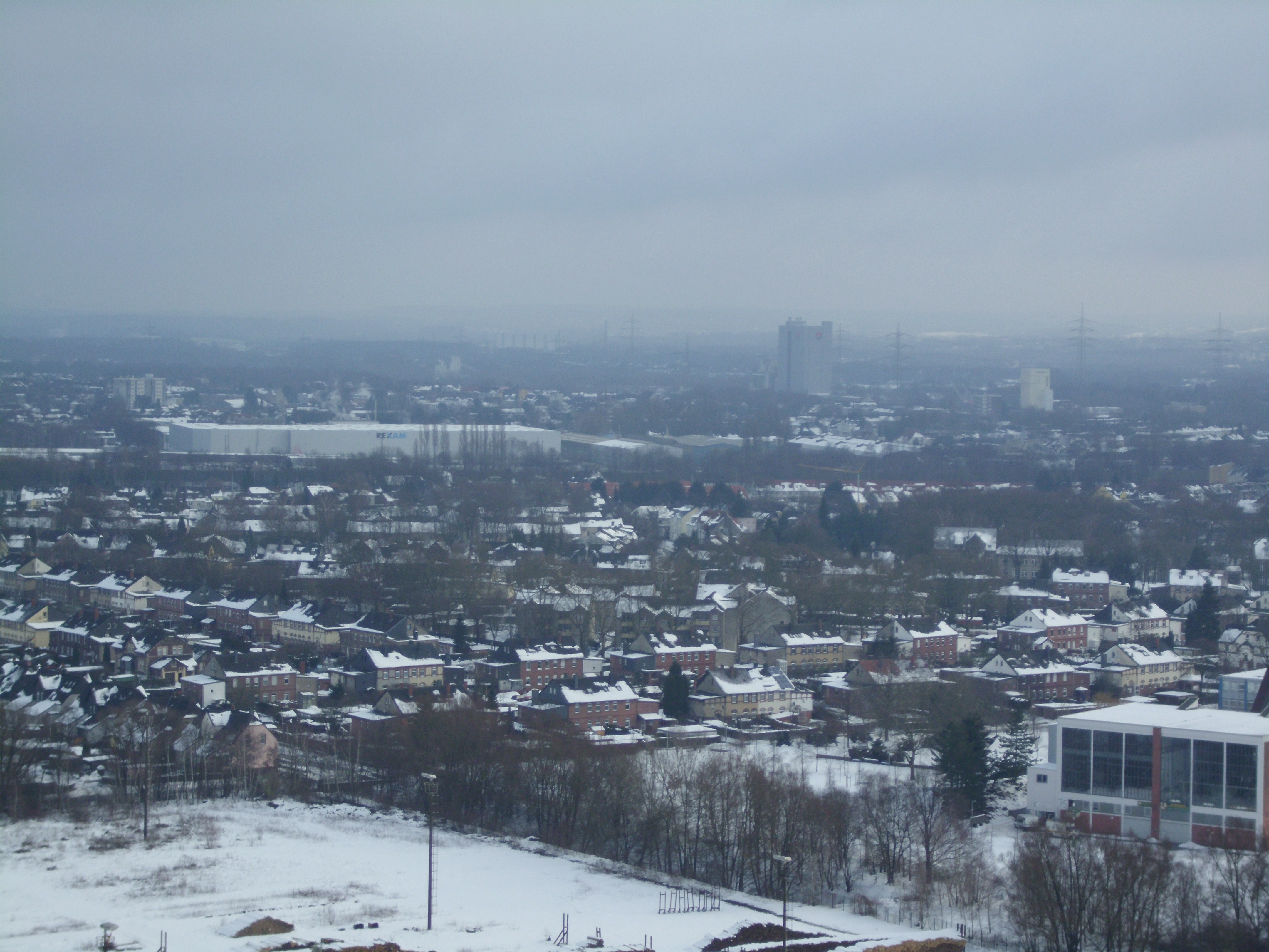 Winterbilder von der Dreieck-Siedlung in Recklinghausen-Hochlarmark Blick von der Halde Hoheward, vorne von links nach rechts verlaufen Karlstraße, von-der-Heydt-Straße und Hüserstraße (rote und hellgelbe Häuser). Links schließen sich Robert- und Ealdstraße an. Im Hintergrund der Silo des Stadthafens Recklinghausen, ganz vorne rechts das Maschinenhaus der Zeche Recklinghausen II.